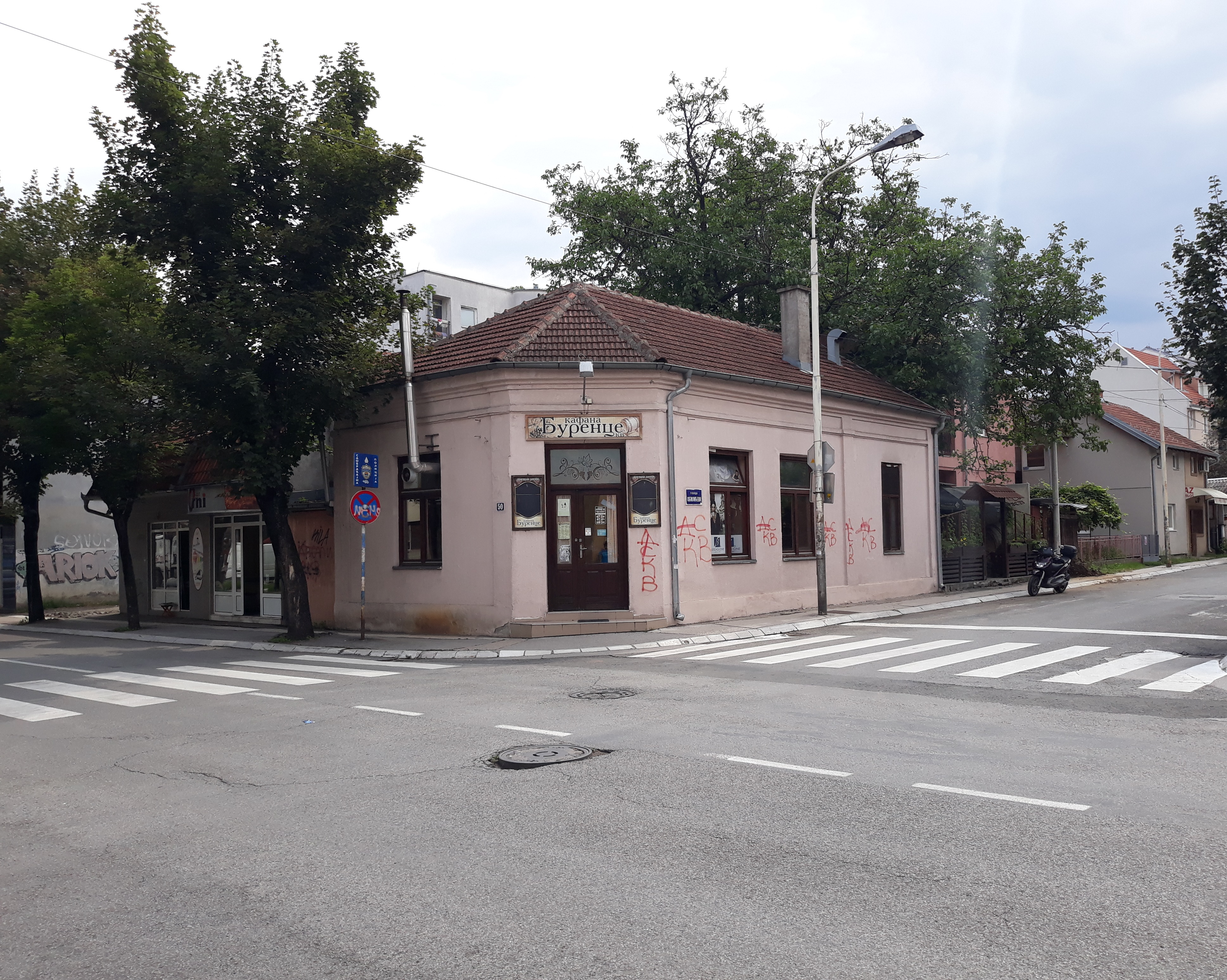 Зграда кафане „Код српског Краља“